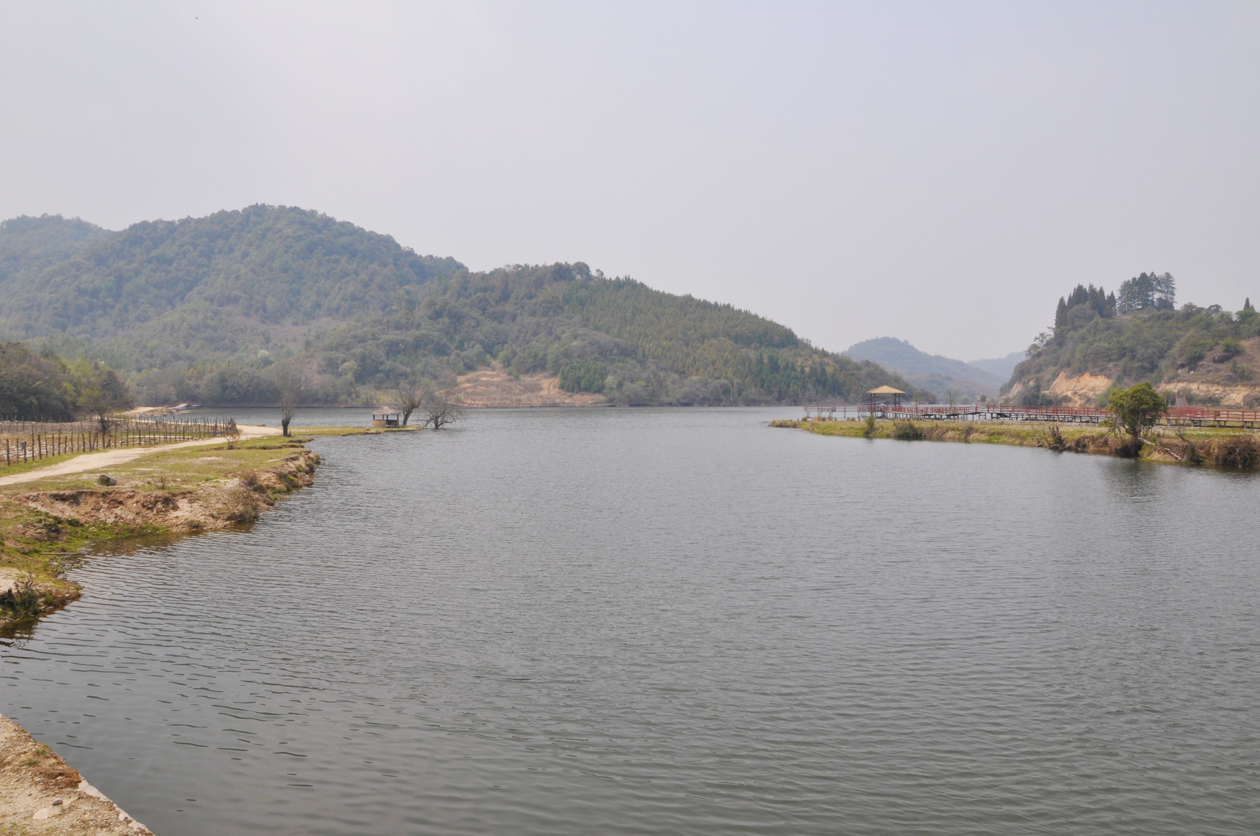 位于盈江县苏典傈僳族乡苏典村民委员会下勐劈村民小组的勐劈河。